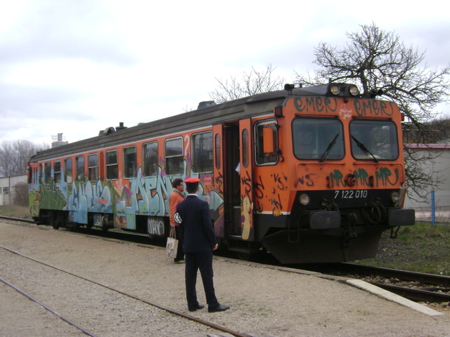 Vlak 7 122 010 na kolodvoru Borut